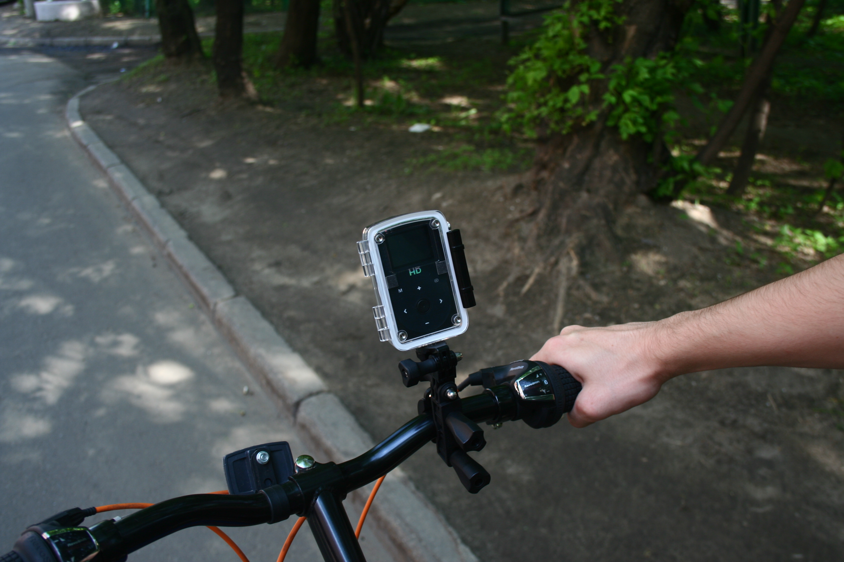 автомобильный видеорегистратор в гермобоксе со специальным креплением на руле велосипеда